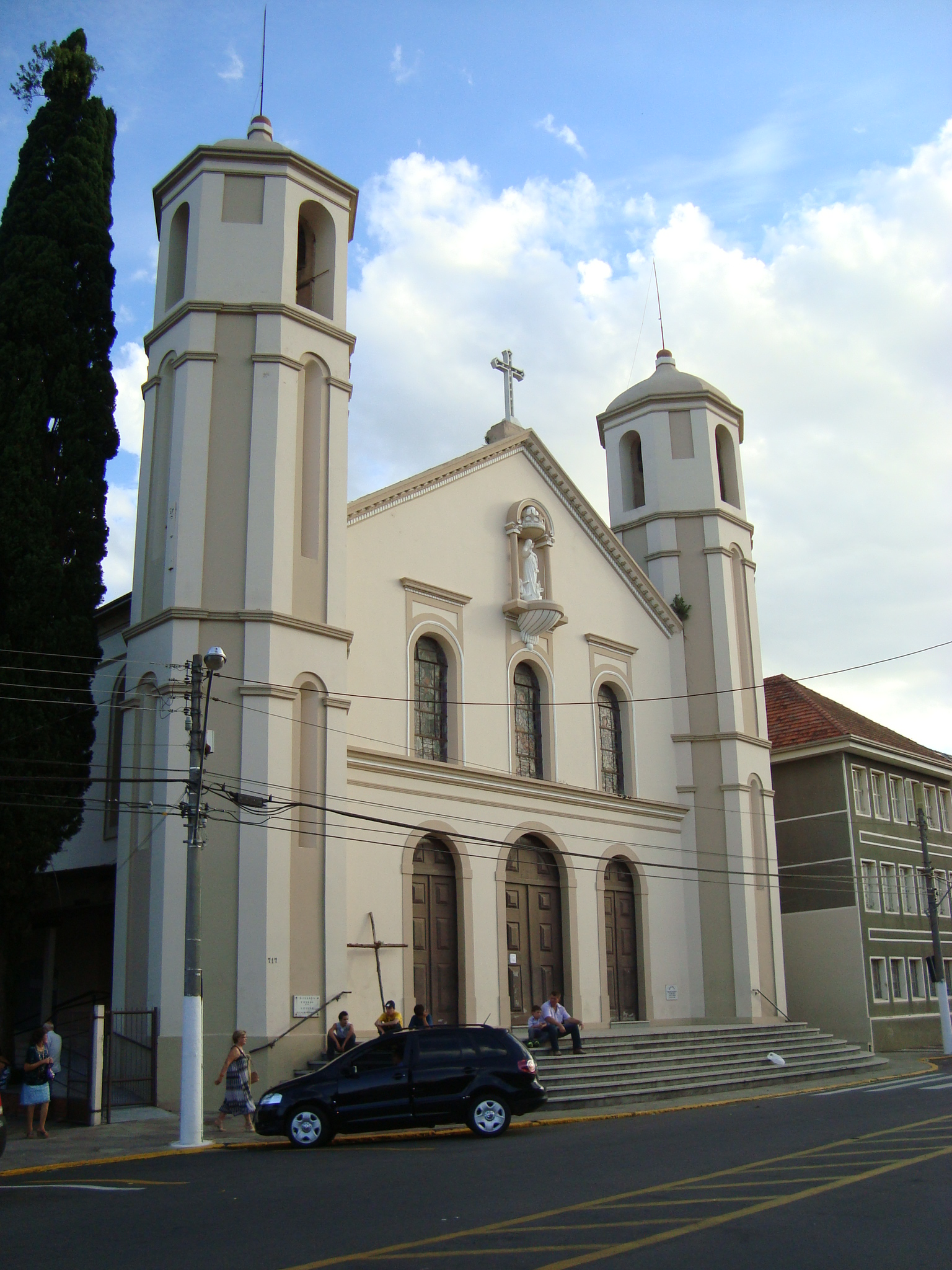 Fachada da Paróquia Nossa Senhora dos Anjos, Gravataí, Rio Grande do Sul, Brasil